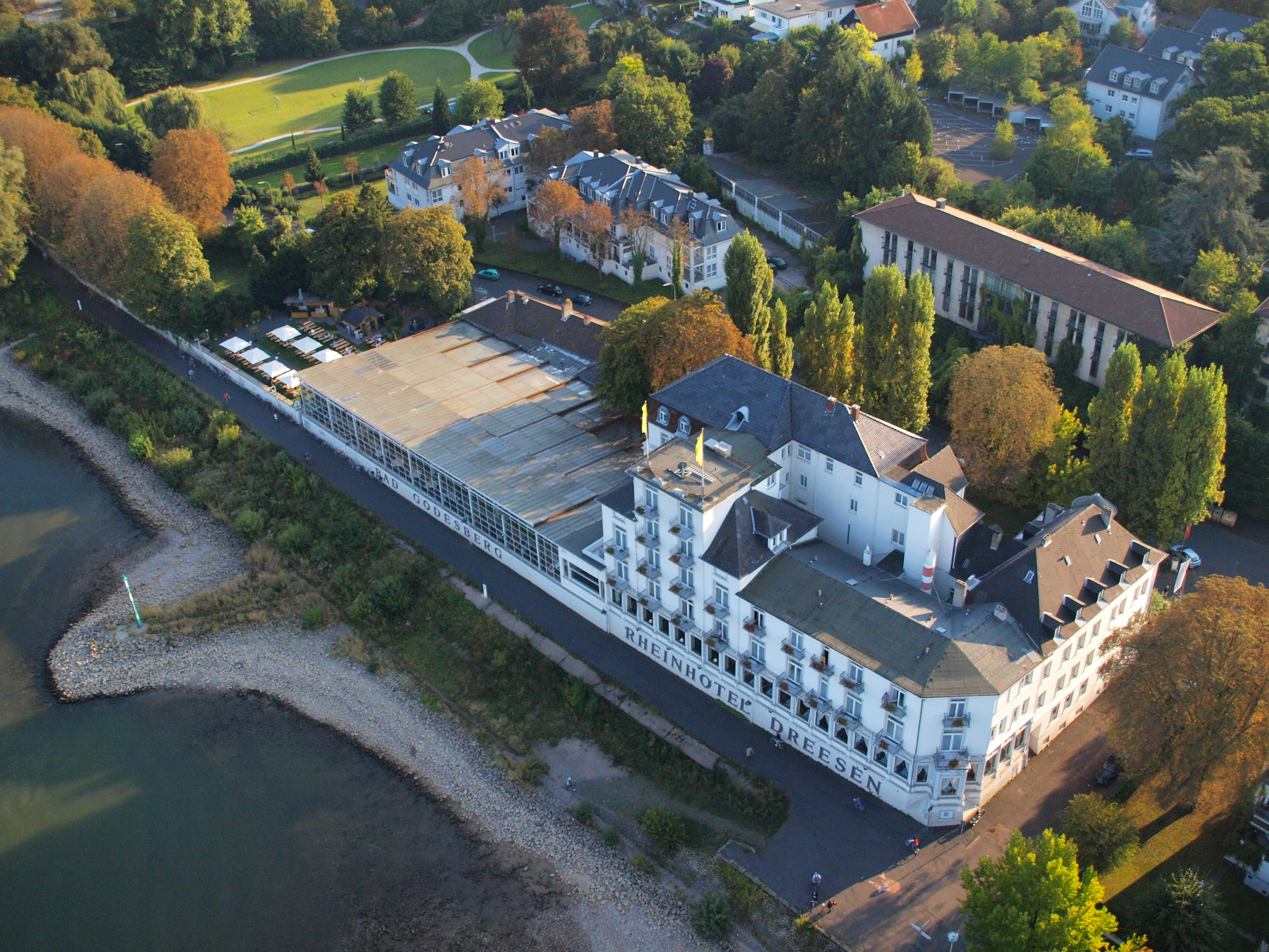 Rheinhotel Dreesen, Rüngsdorf, Bonn: Luftfaufnahme aus nördlicher Richtung